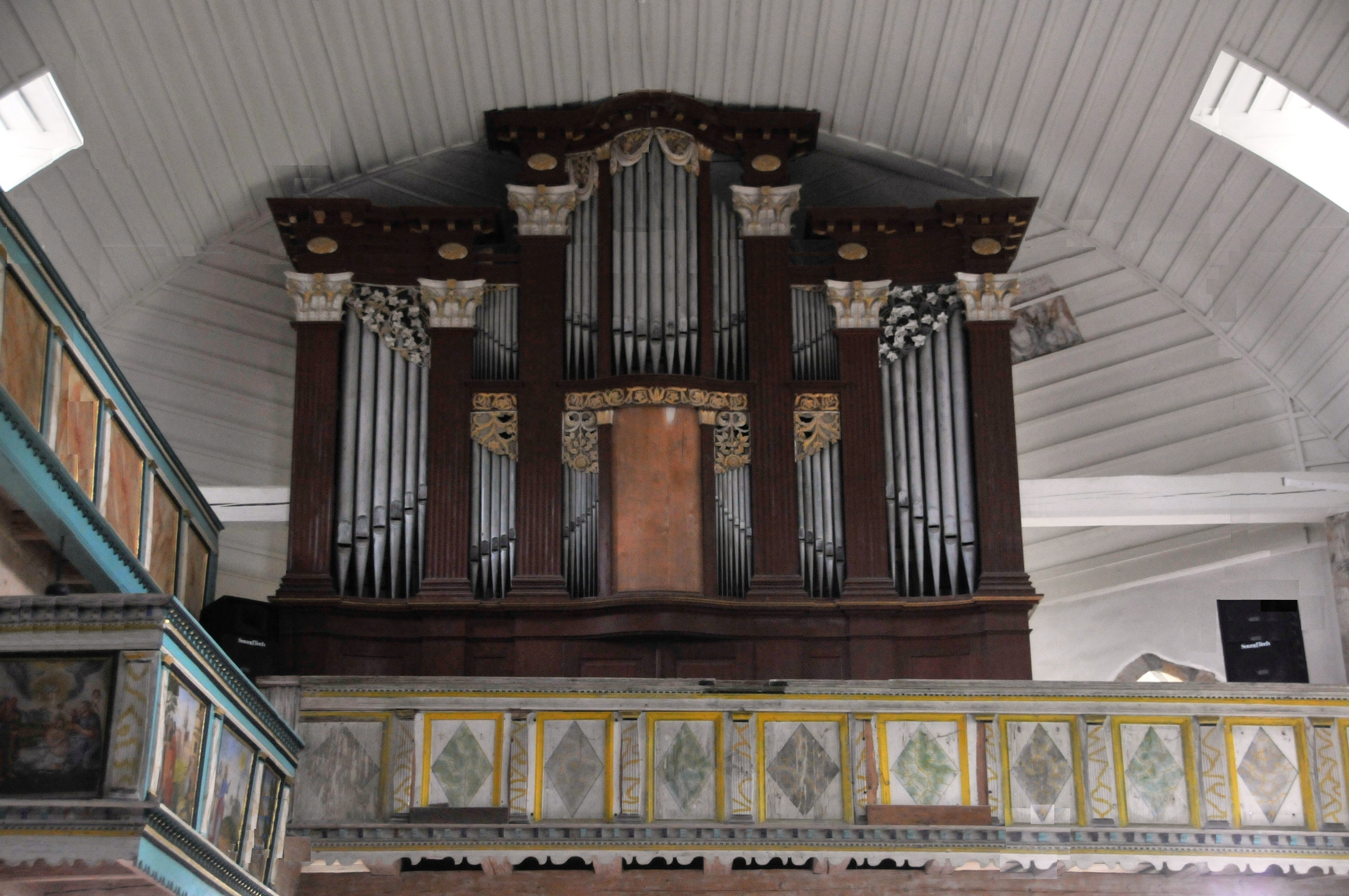 Ermstedt, Kirche, Orgel